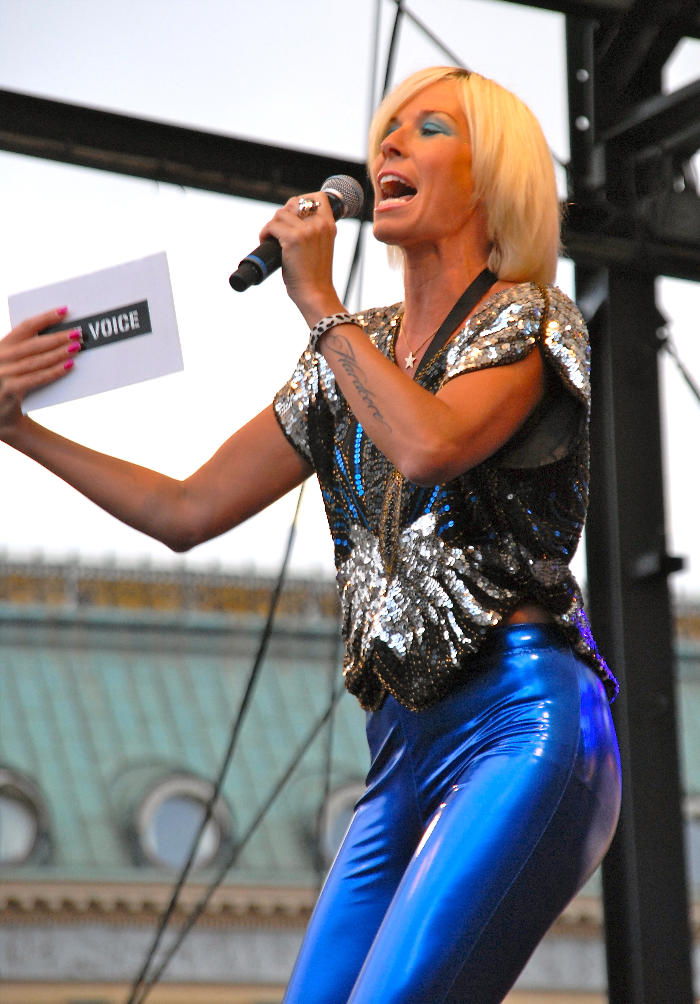 Josefin Crafoord på VOICE´11 på Ung08-festivalen i Kungsträdgården 20 augusti 2011.